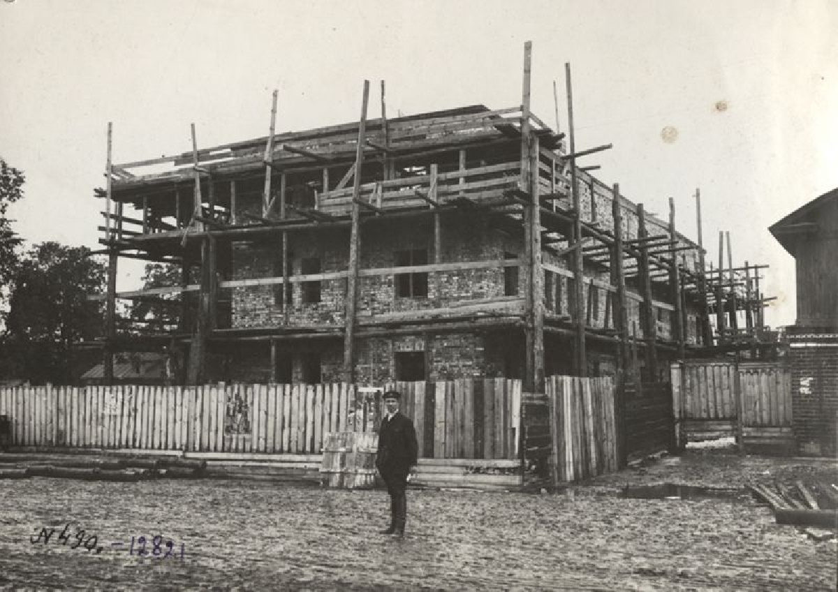 Строительство жилого дома на улице Льва Толстого в г. Муром Муромский историко-художественный музей